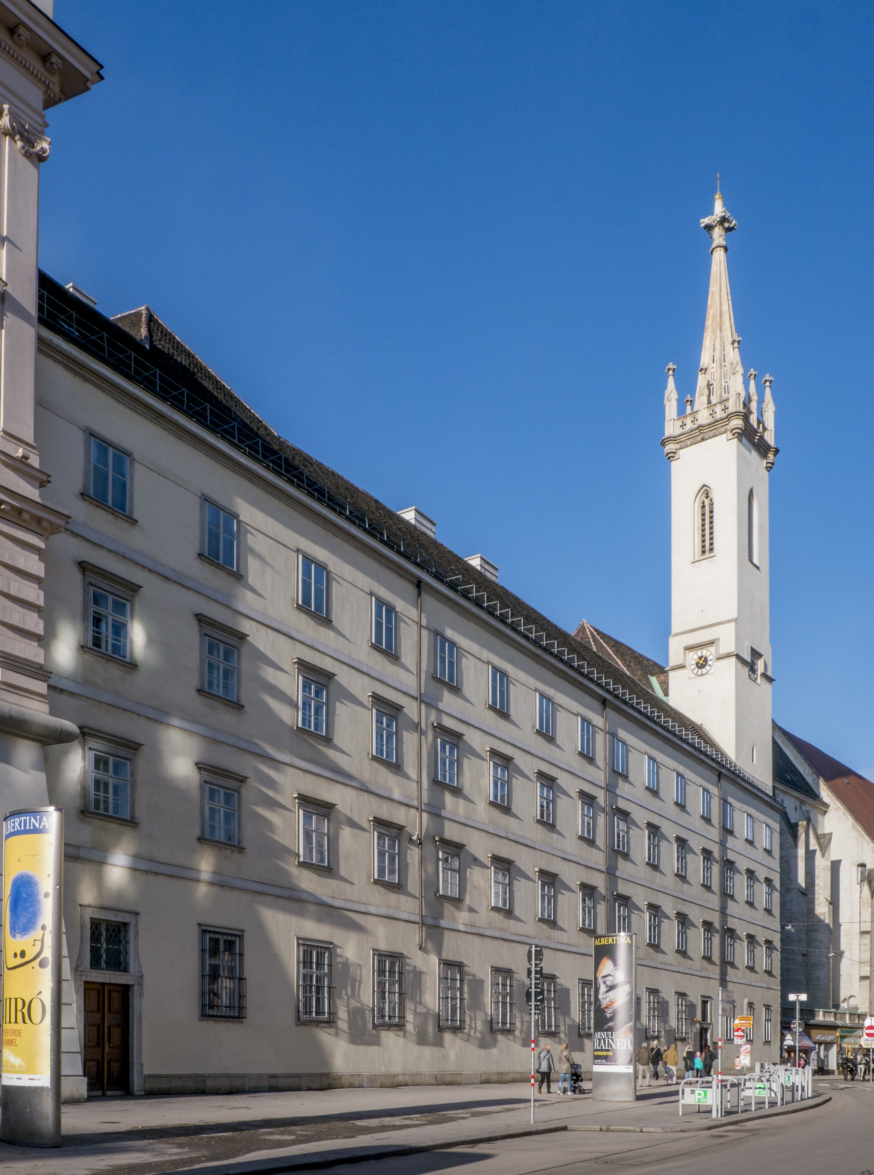 Augustinerkloster mit Augustinersaal und Refektorium, Augustinerdurchgang